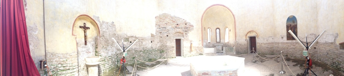 Foto panoramica del battistero di Santa Eufemia a Grado (GO).